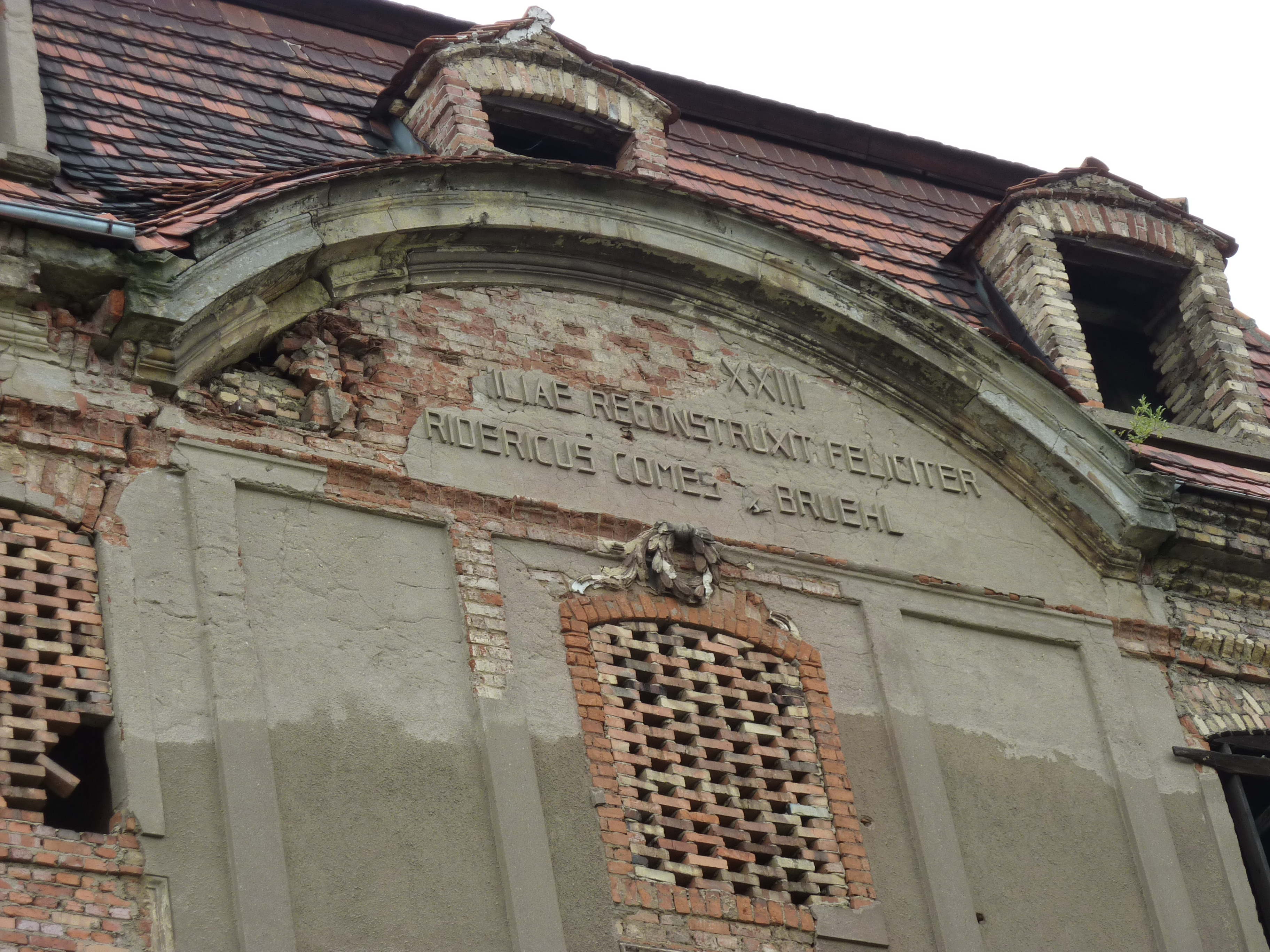 Pałac Brühlów: inskrypcja na ścianie skrzydła północnego: [AD MCM]XXIII [FAM]ILIAE RECONSTRUXIT FELICITER [F]RIDERICUS COMES A BRUEHL Rodzina buduje szczęście - inskrypcja upamiętniającą odtworzenie siedziby rodziny przez Friedrich hrabia von Brühl w 1923 r.